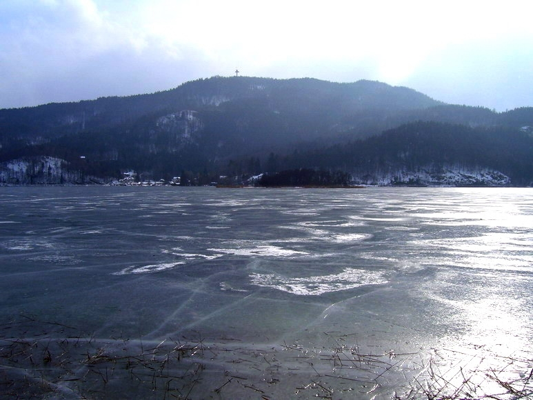 Wörthersee in winter